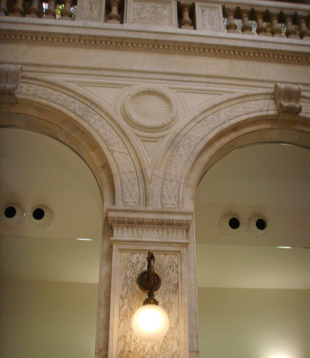 Palazzo delle poste (Firenze), hall, dettaglio